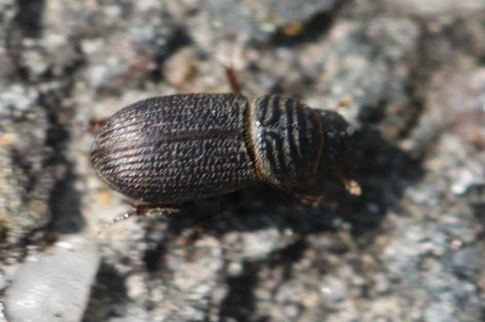 Rhyssemus germanus, am 5.5.2017 in Walldorf/Baden